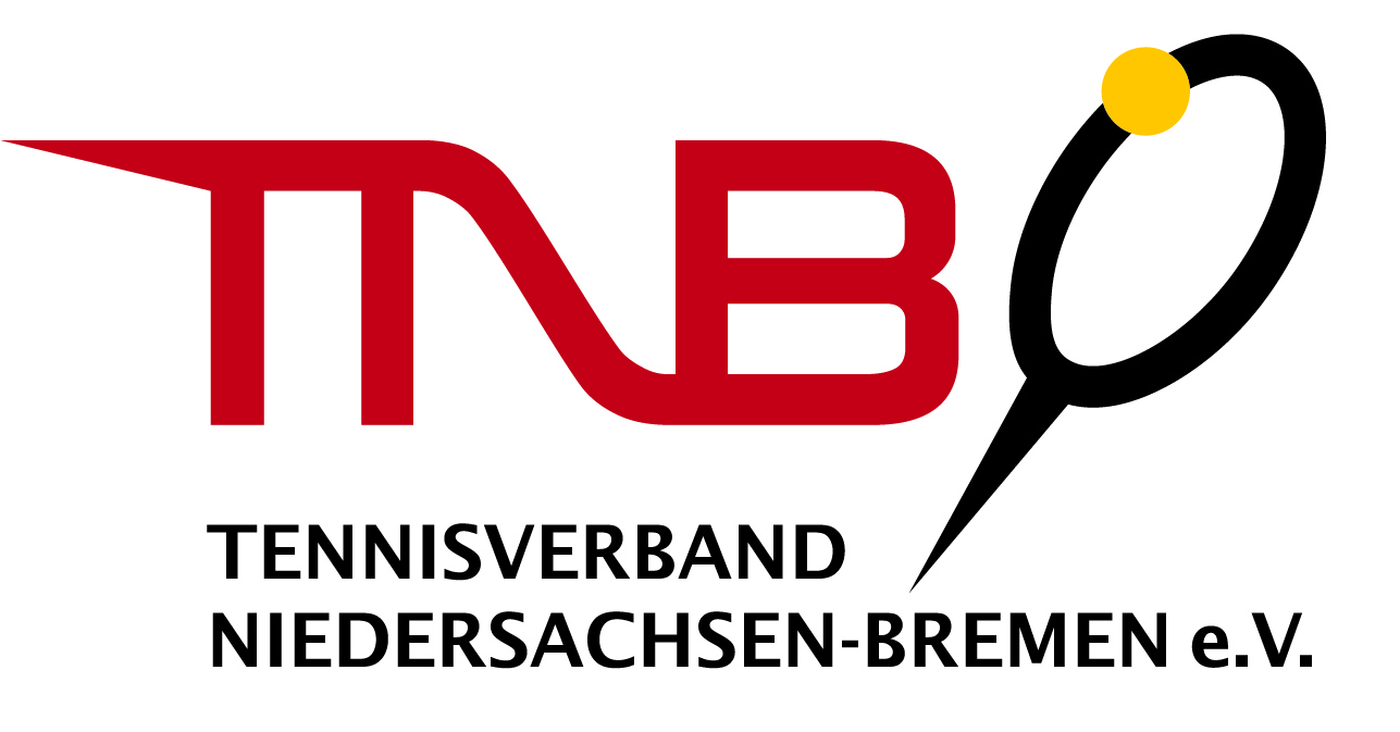 Das offizielle Logo des TNB